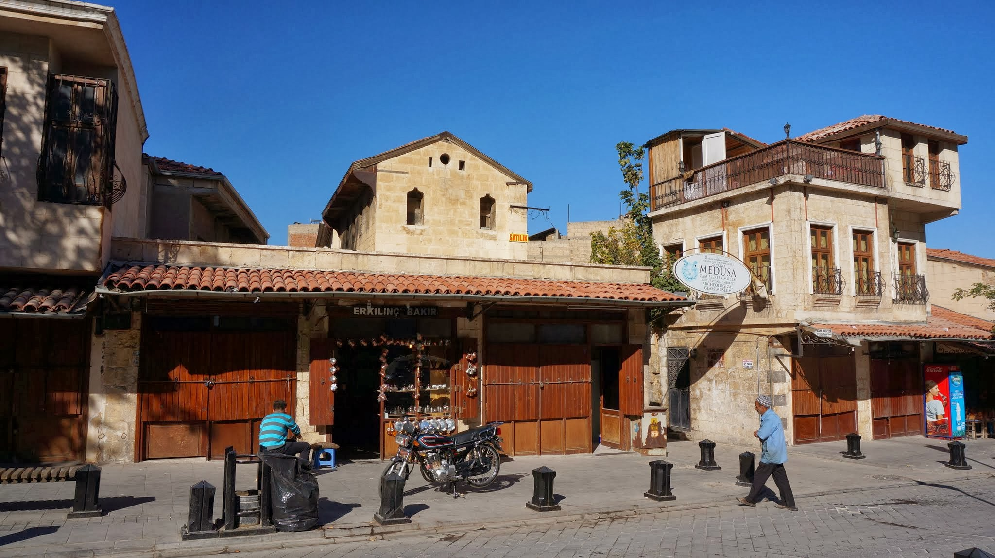 Gaziantep, Turkey